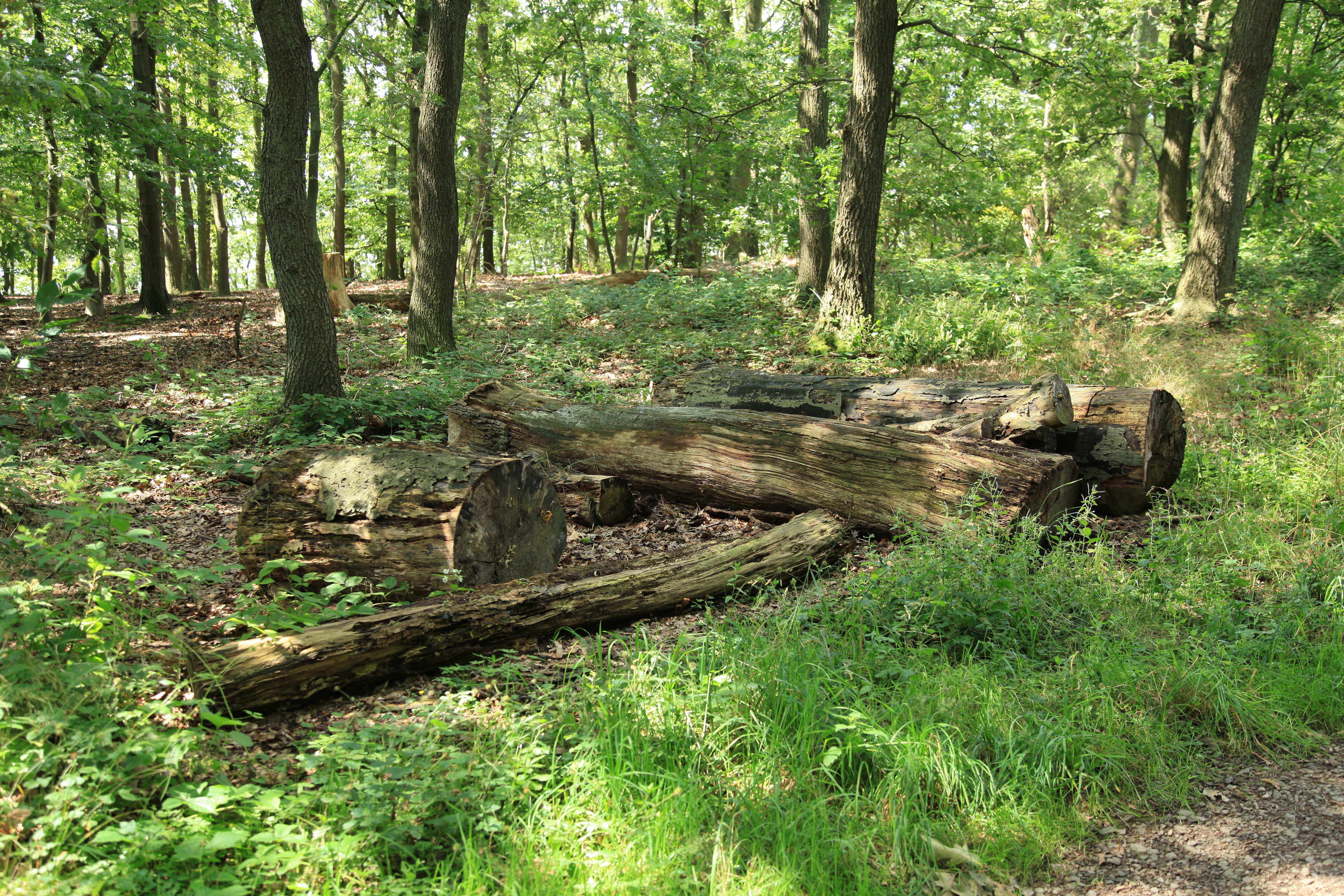 Höhenweg auf dem Goldberg in Hagen, Wald im großen Landschaftsschutzgebiet „Selbecke“ (das LSG geht deutlich über den namengebenden Bereich an der Selbecke hinaus)